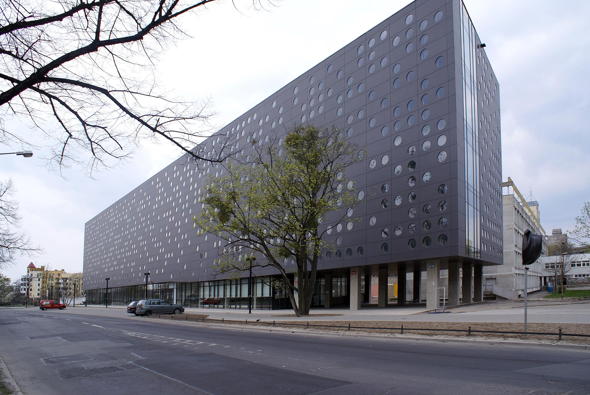 Wrocław, zespół Politechniki Wrocławskiej, 1905-1911, 1935